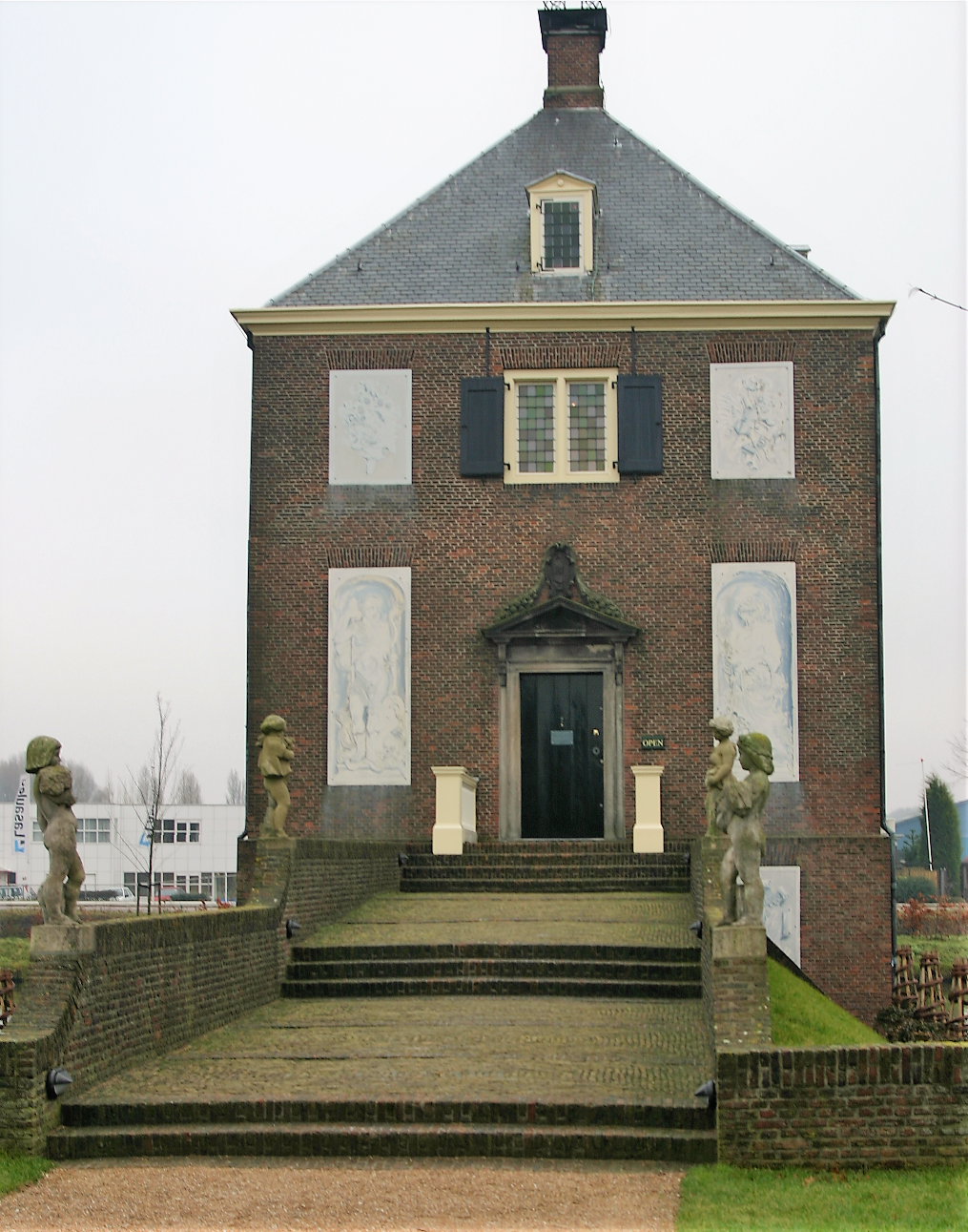 Hofwijck, designed by Jacob van Campen for Constantijn Huygens, built in 1642.